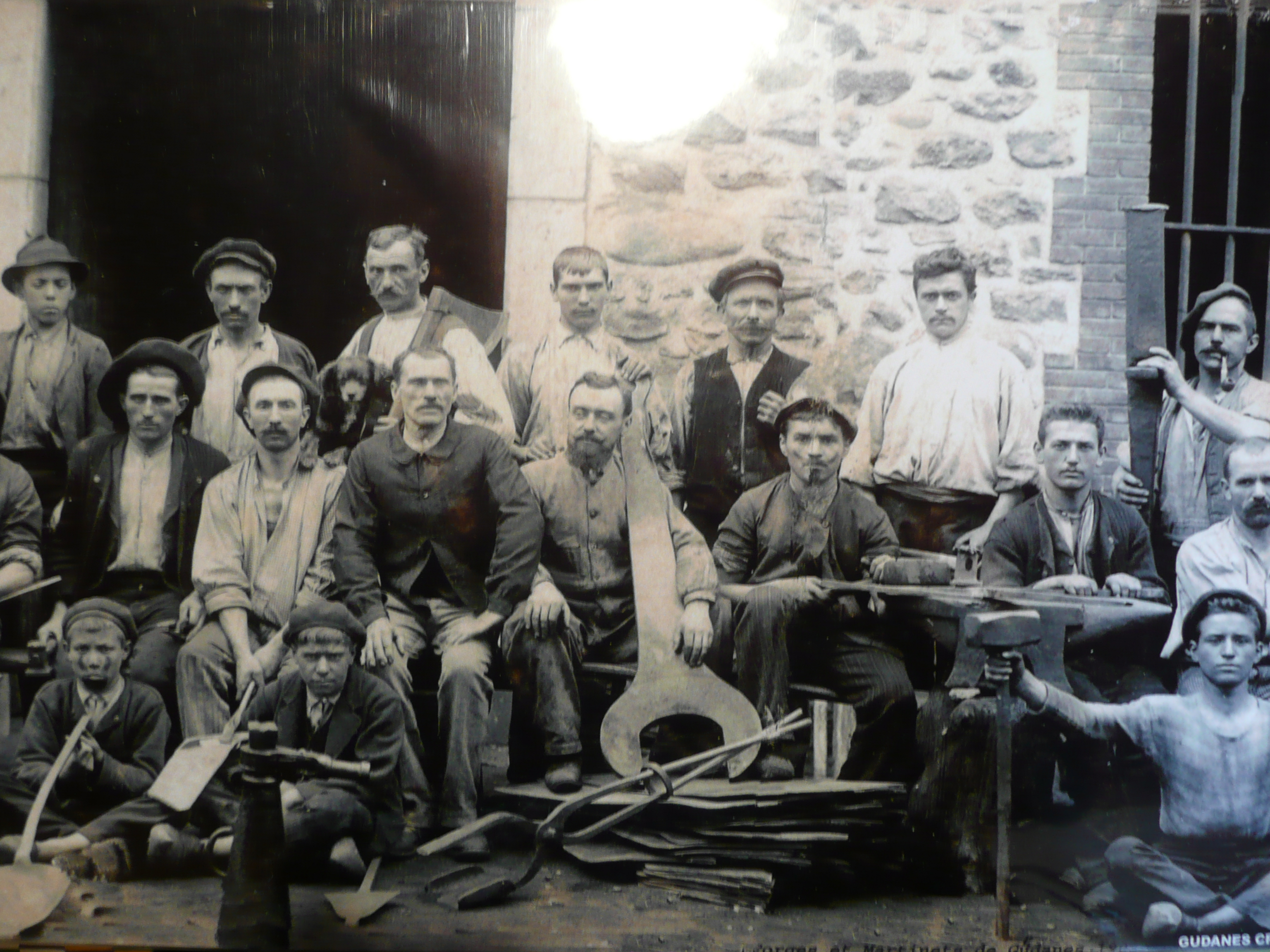 Une équipe d'ouvriers des forges et martinets de Gudanes (Château-Verdun, Ariège, France).